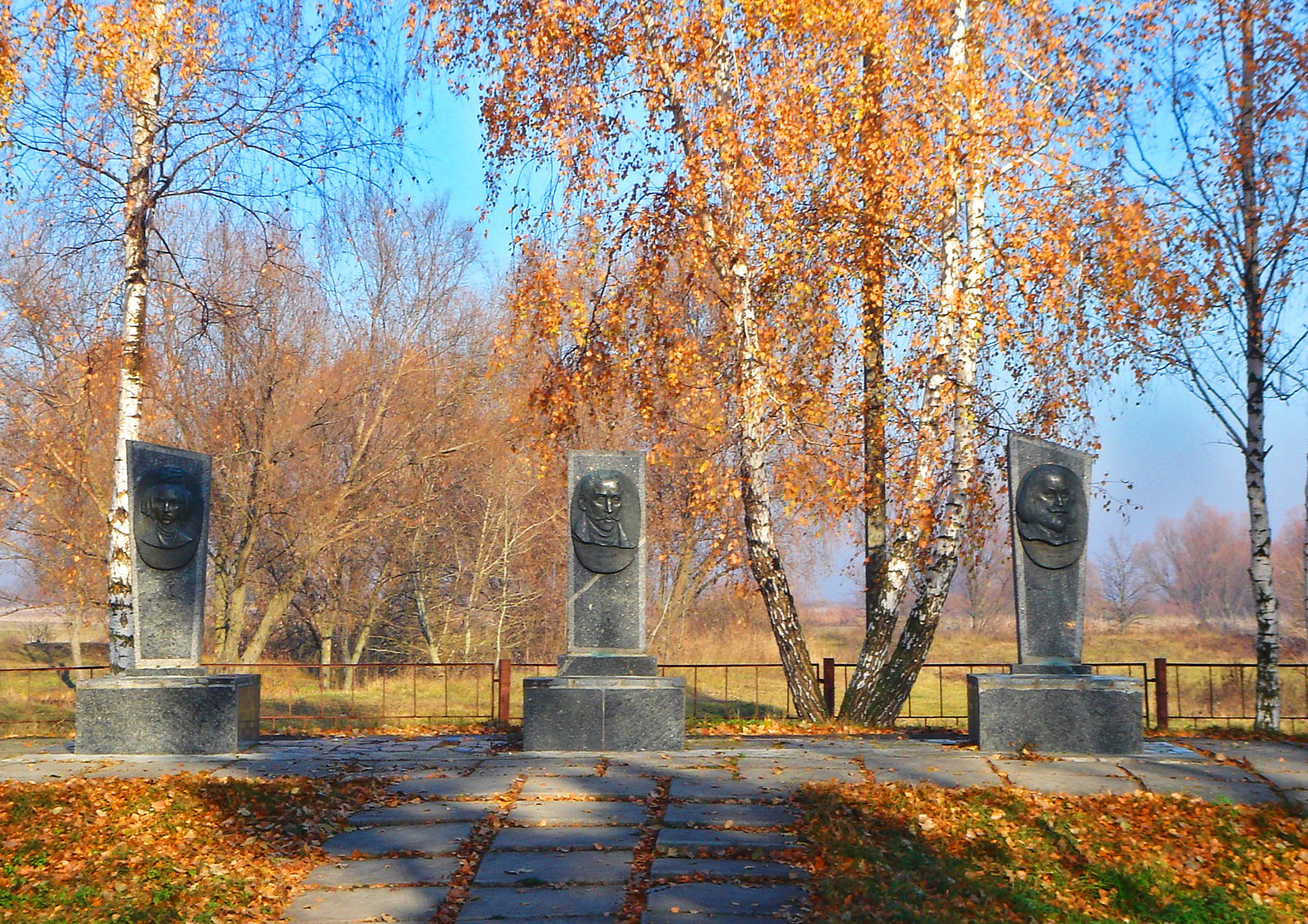 Могилы декабристов Село Вороньки Бобровицкого района Черниговской области 50°41'23.00" Пн 31°34'58.00" сх Князь Сергей Григорьевич Волконский (1788 - 1865) Генерал-майор, бригадный командир 19 пехотной дивизии, герой Отечественной войны 1812 года, активный участник восстания декабристов, осужден к смертной казни, впоследствии замененной на 20 лет каторги. Княгиня Мария Николаевна Волконская (1805 - 1863) Дочь Николая Раевского - героя Отечественной войны 1812 года, по линии матери правнучка М. В. Ломоносова, жена князя С. Г. Волконского, несмотря на сопротивление родных, поехавшая за ним в Сибирь. Воспета в поэзии А. С. Пушкина, А. И. Одоевского, Н. А. Некрасова Алекса́ндр Ви́кторович По́джио (1798 - 1873) — декабрист. Младший брат декабриста Иосифа Викторовича Поджио Кстати, могила И. В. Поджио в Иркутске — памятник истории федерального значения